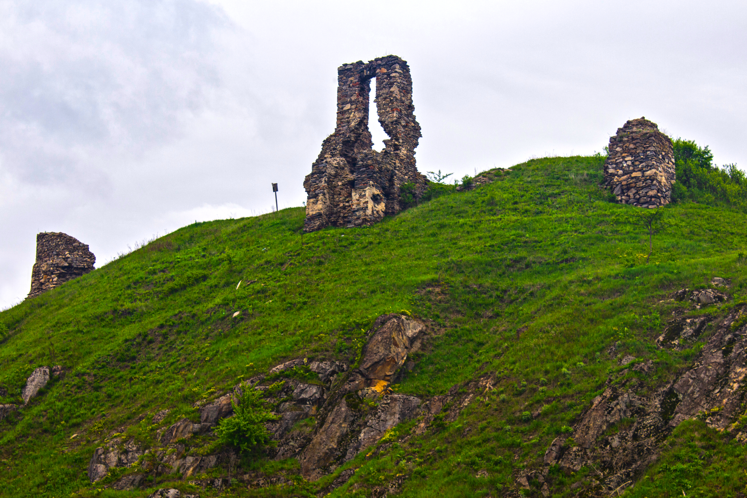 Руїни замку (мур.), с.Губків